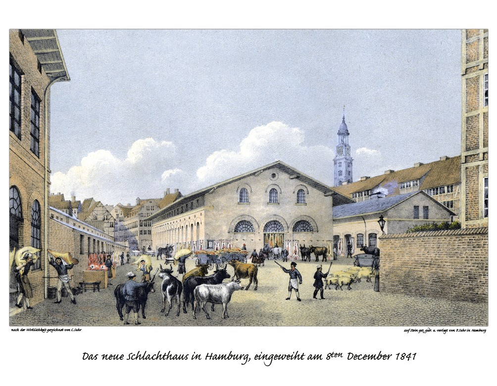 Das neue Schlachthaus in Hamburg, eingeweiht 1841..., gezeichnet von Christoffer Suhr, Litho von Peter Suhr